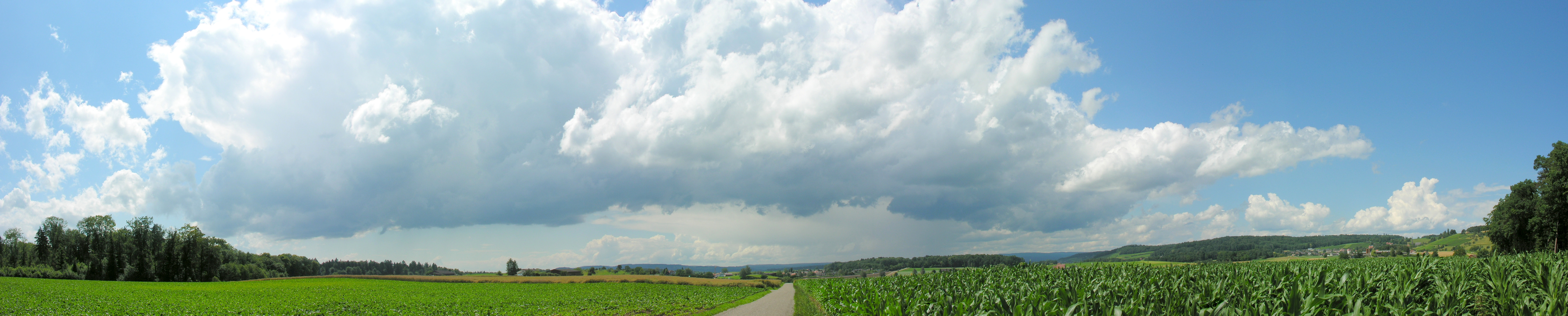 Switzerland, Zürich, Near Trüllikon